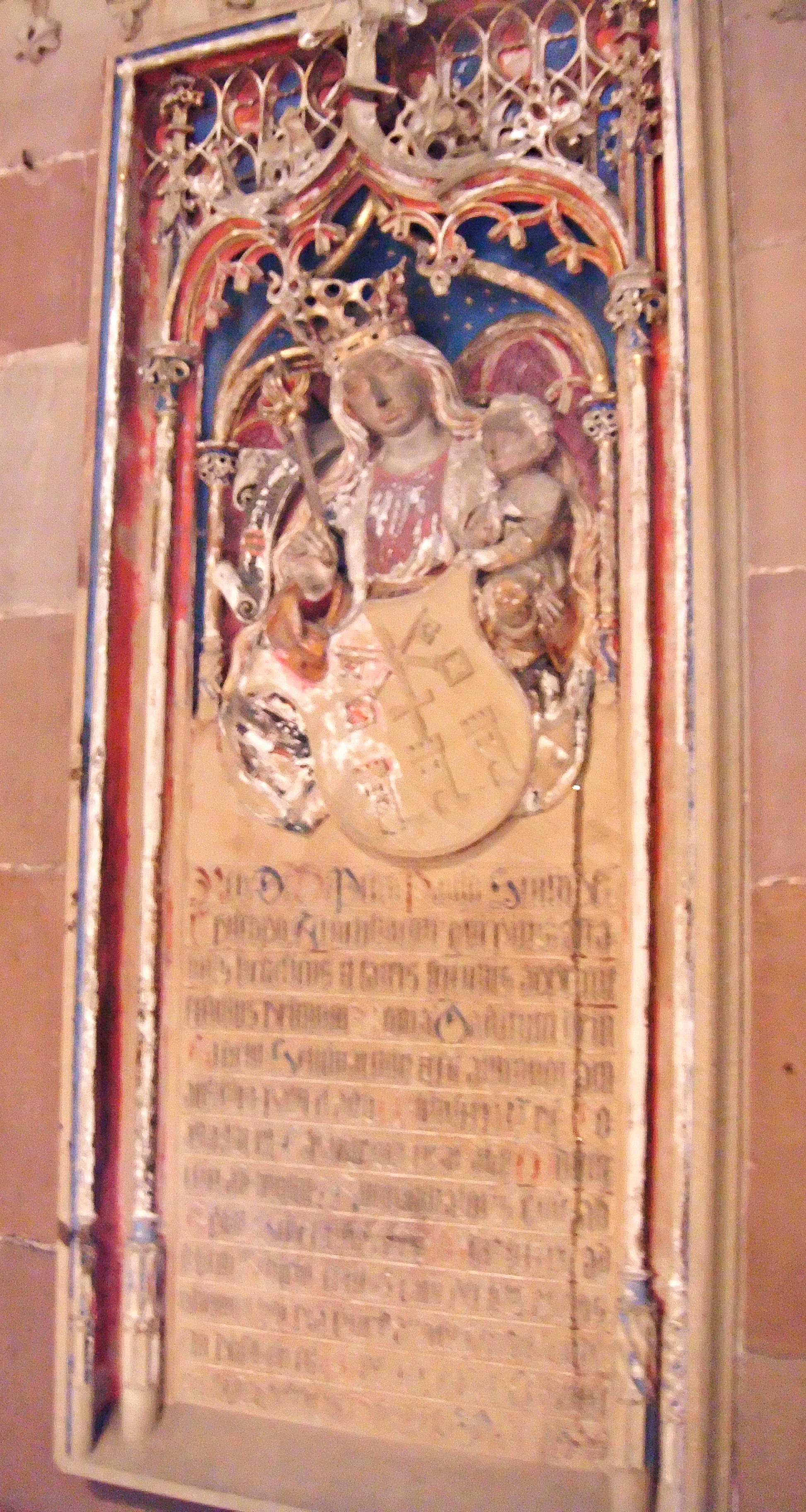 Epitaph Bischof Peter Paul Stumpf (1822-1890), Straßburg, Elsass, Straßburger Münster